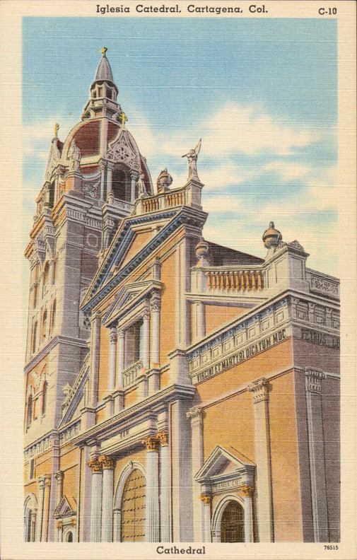 Postal de la Catedral de Cartagena de Indias, cuando tenía la fachada remodelada, actualmente el templo está restaurado y tiene la apariencia original del periodo colonial, excepto la torre pues la original se perdió para siempre.